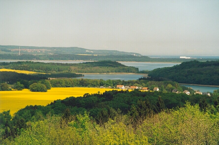 Bergen auf Rügen - Blick vom Rugard-Turm nach Nordost über den kleinen Jasmunder Bodden in Richtung Ostsee